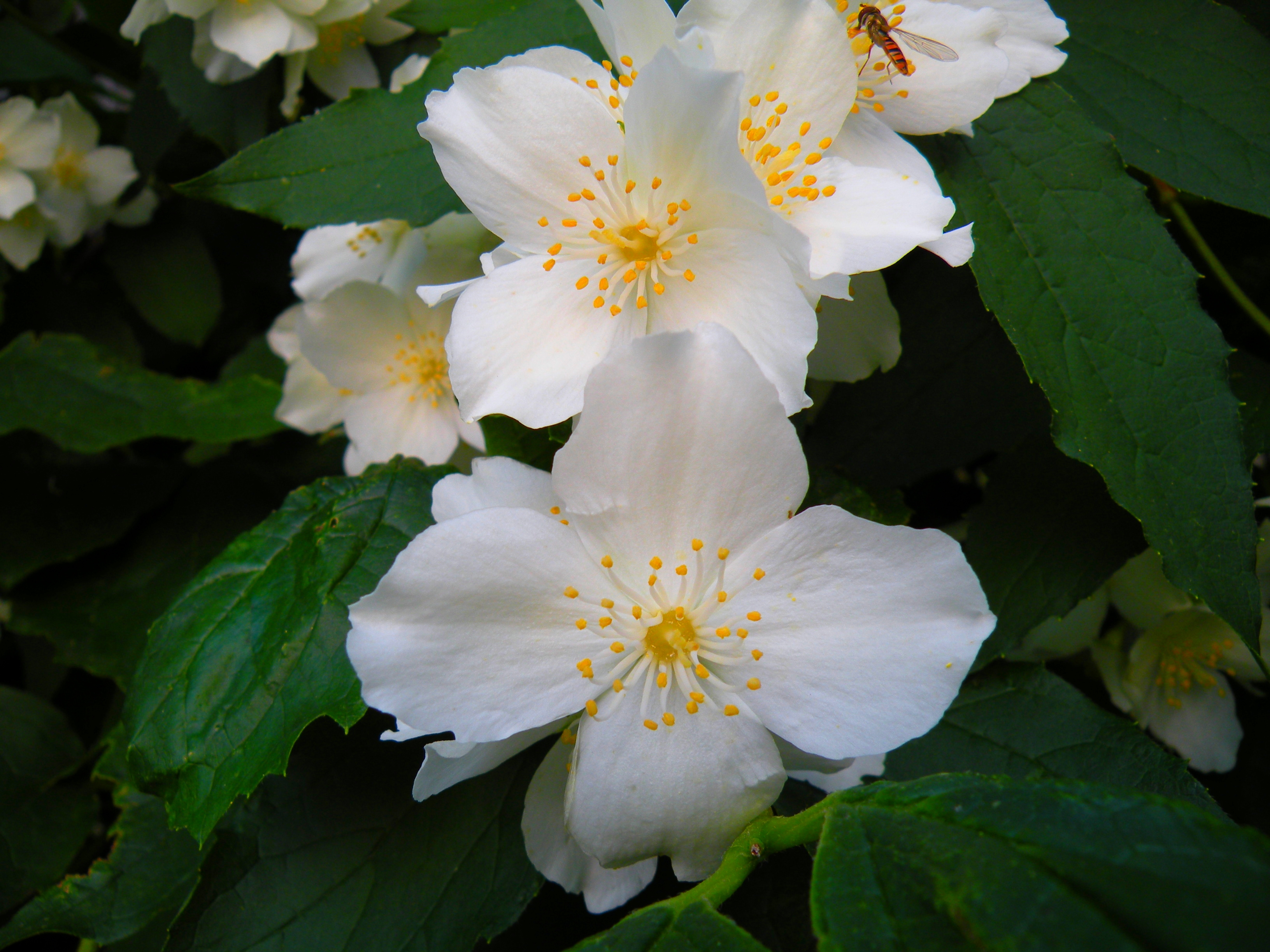 Kwiat jaśminowca (Philadelphus sp.) z widocznymi pręcikami oraz słupkiem.